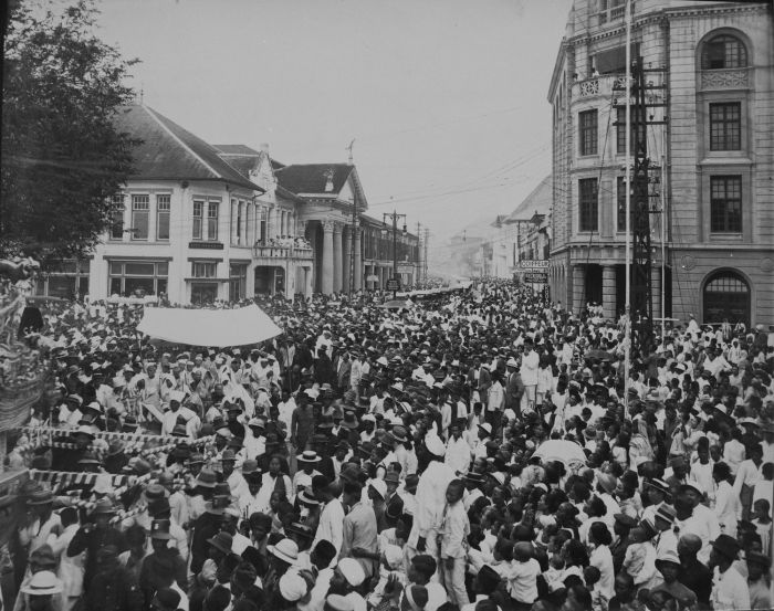 foto. De menigte in een straat te Medan bij de Chinese begrafenisstoet van de op 4 februari 1921 overleden majoor Tjong A Fie